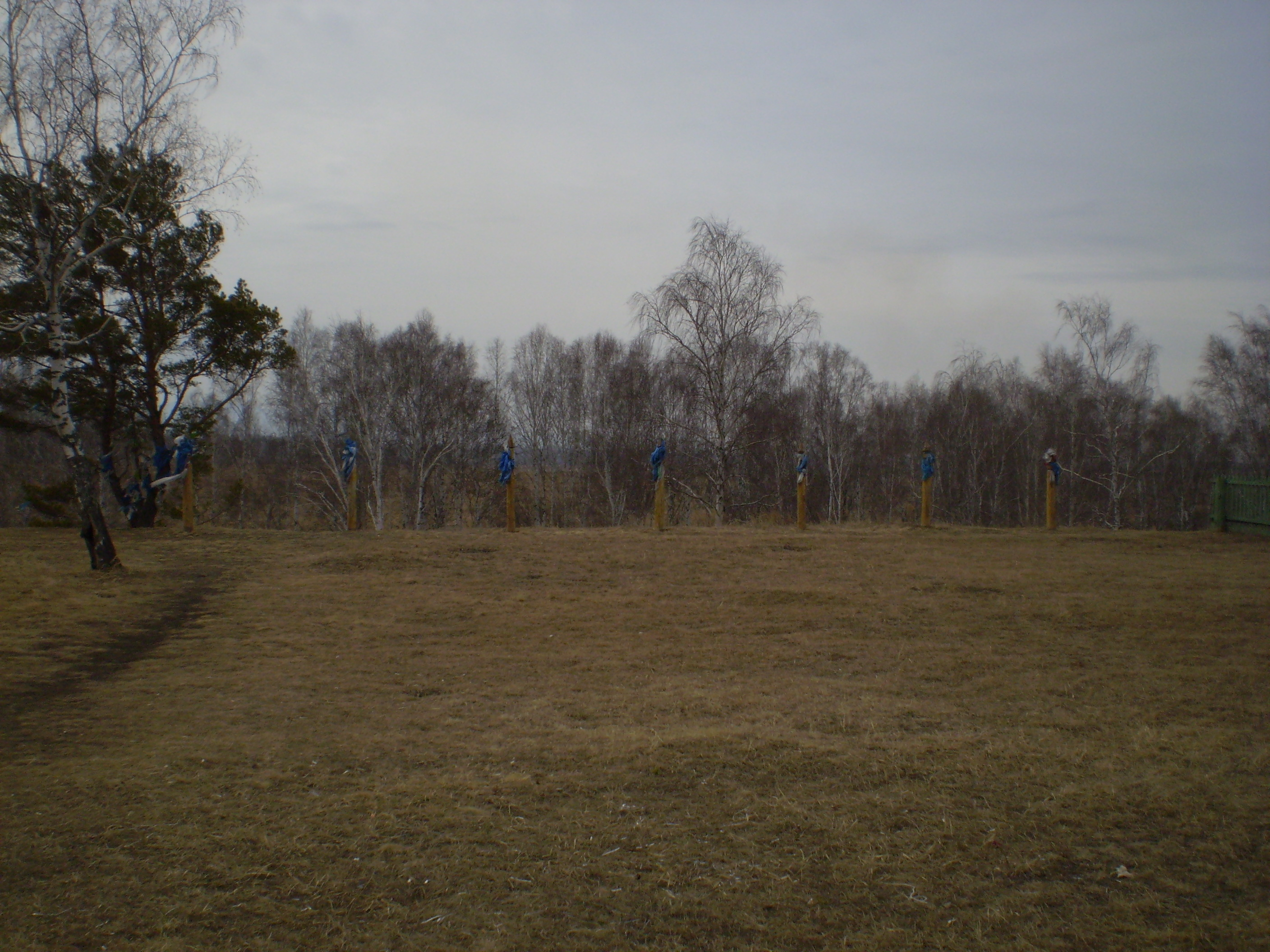 Фофановский акрополь в Кабанском районе Бурятии.